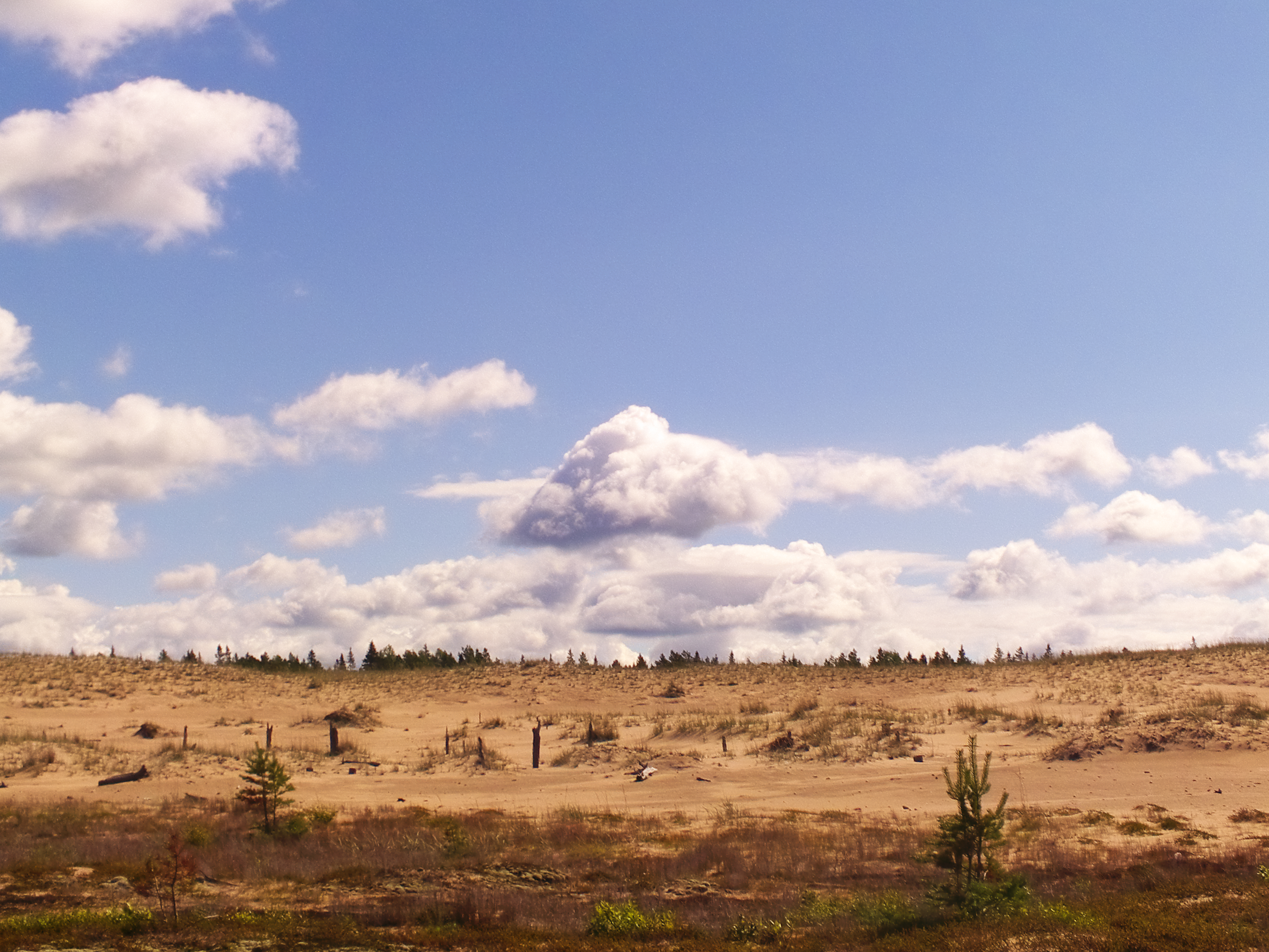 Национальный парк Онежское Поморье, Онежский район This image is related to the protected area of Russia number 2900123